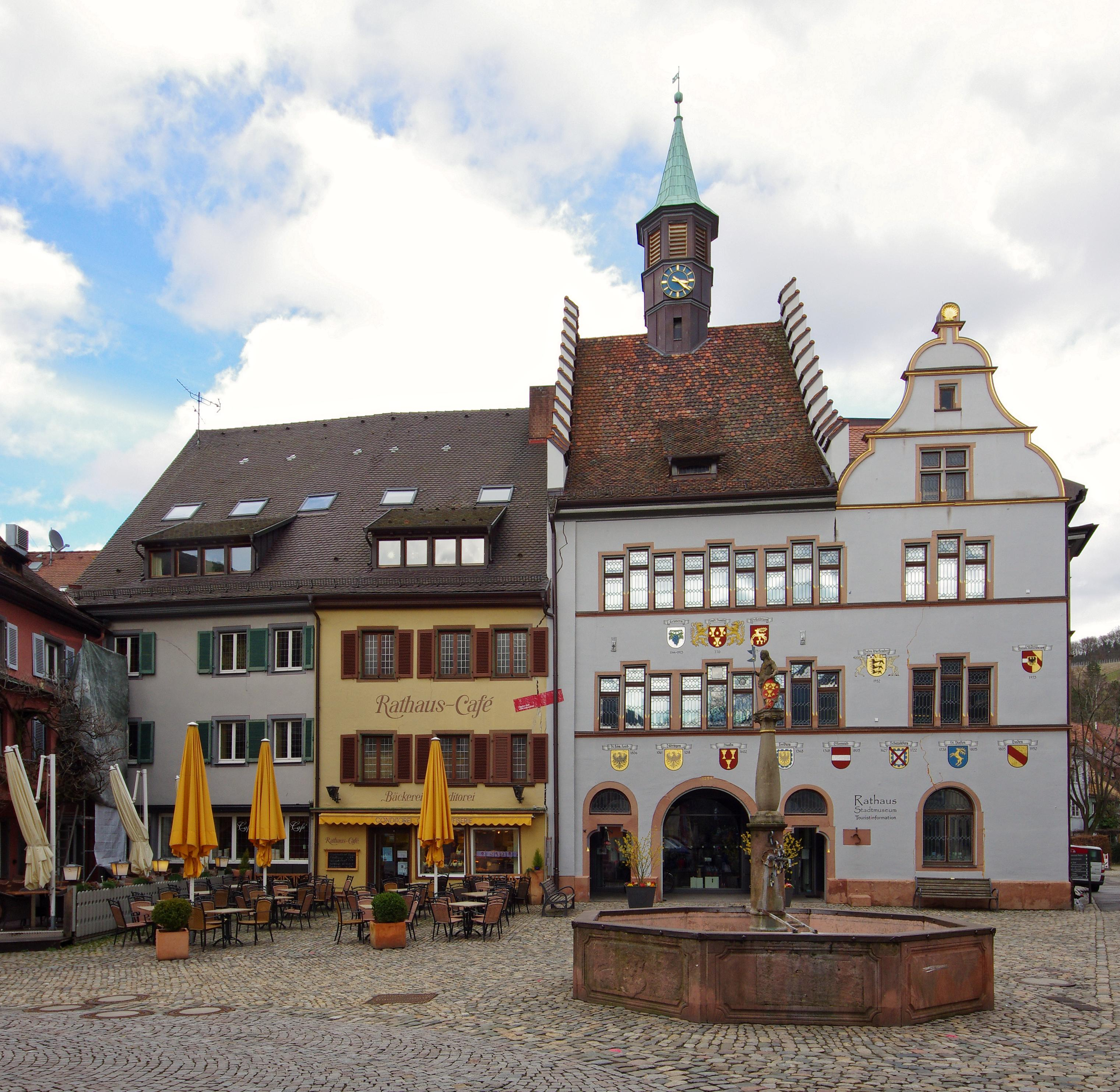 Gebäude in Staufen